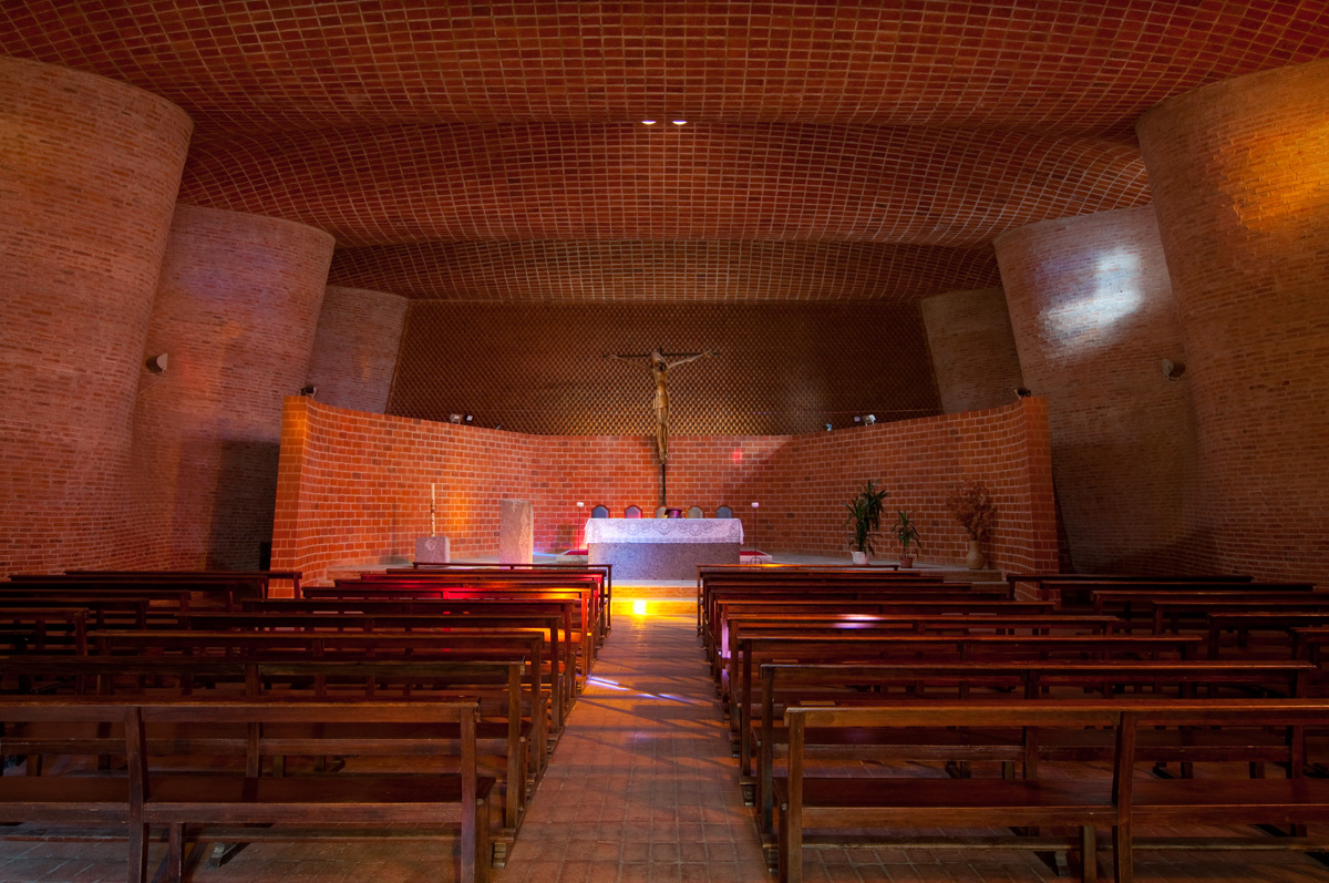 Iglesia de Cristo Obrero y Nuestra Señora de Lourdes. Ubicada en el departamento de Canelones